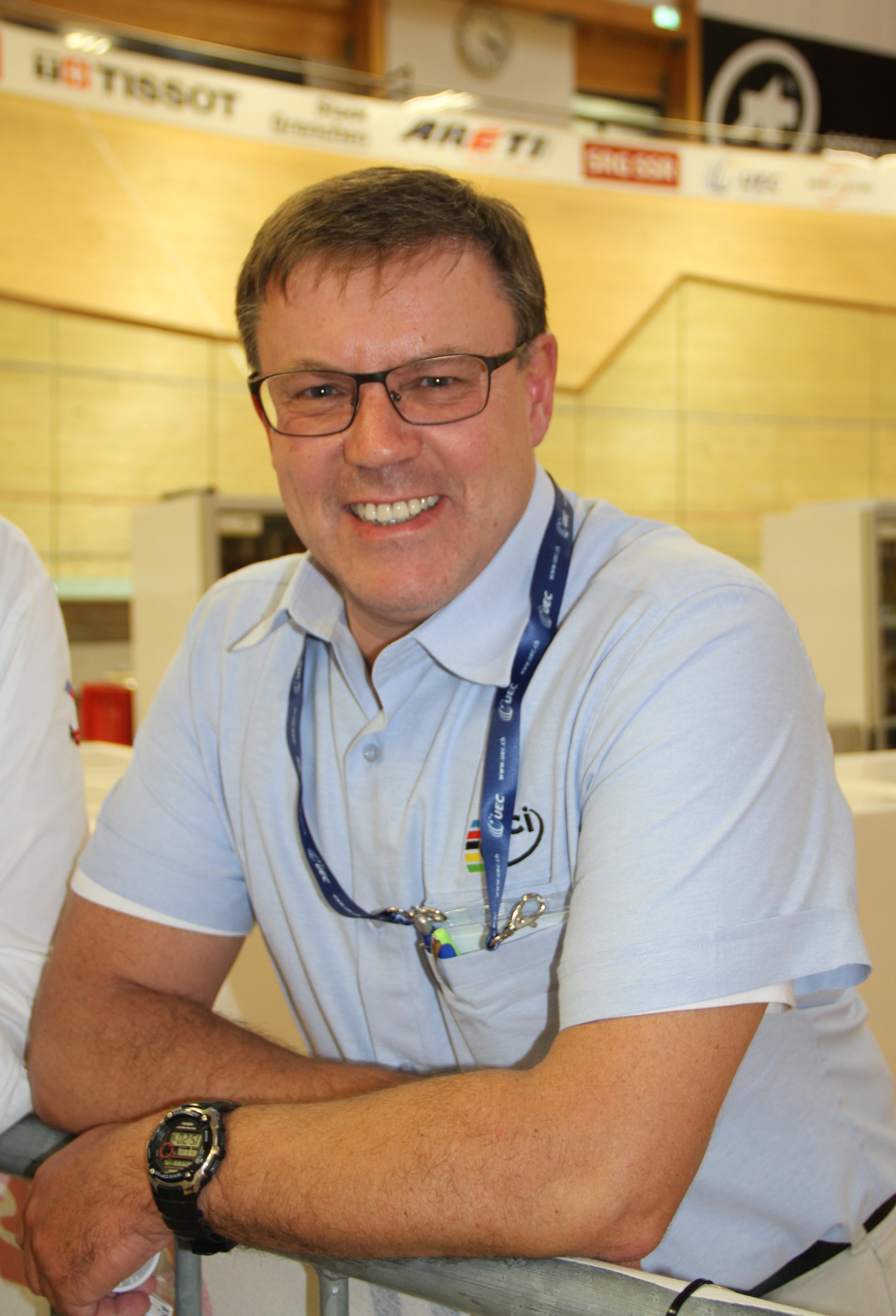 Alexander Donike, UCI-Kommissär The making of this document was supported by the Community-Budget of Wikimedia Germany.